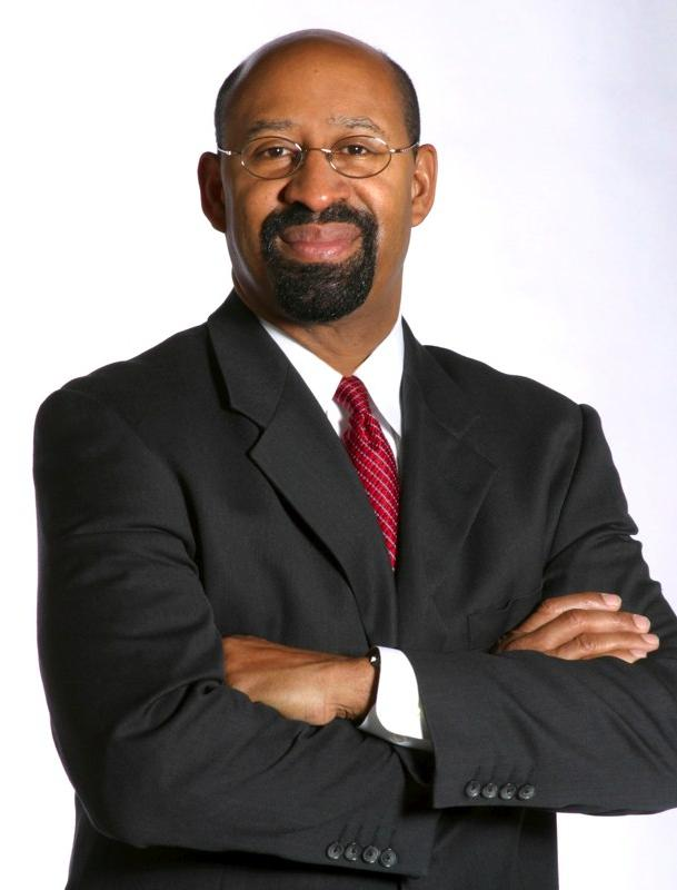 Michael Nutter